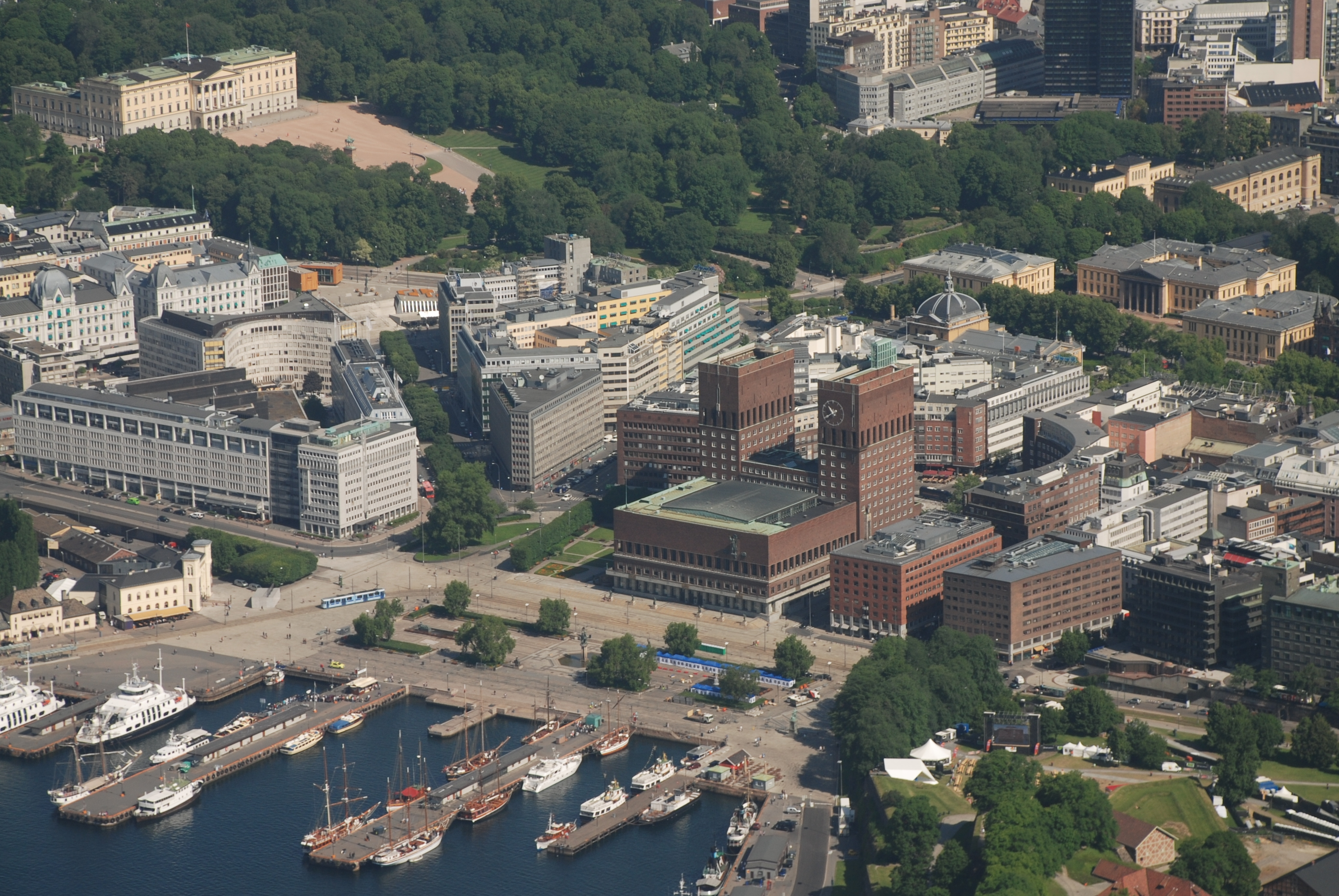 Oslo Rådhus